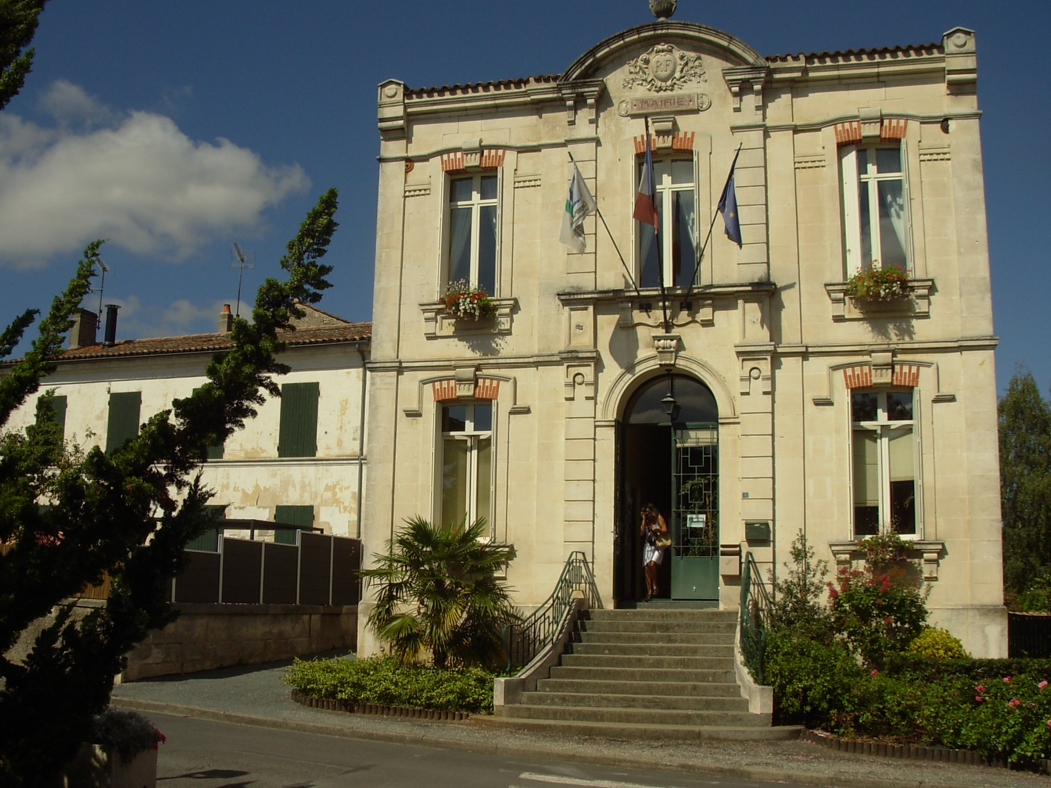 L'Hôtel de ville de Saint-Georges-du-Bois (en Charente-Maritime) remplace le Panthéon qui était l'ancienne mairie de la commune.